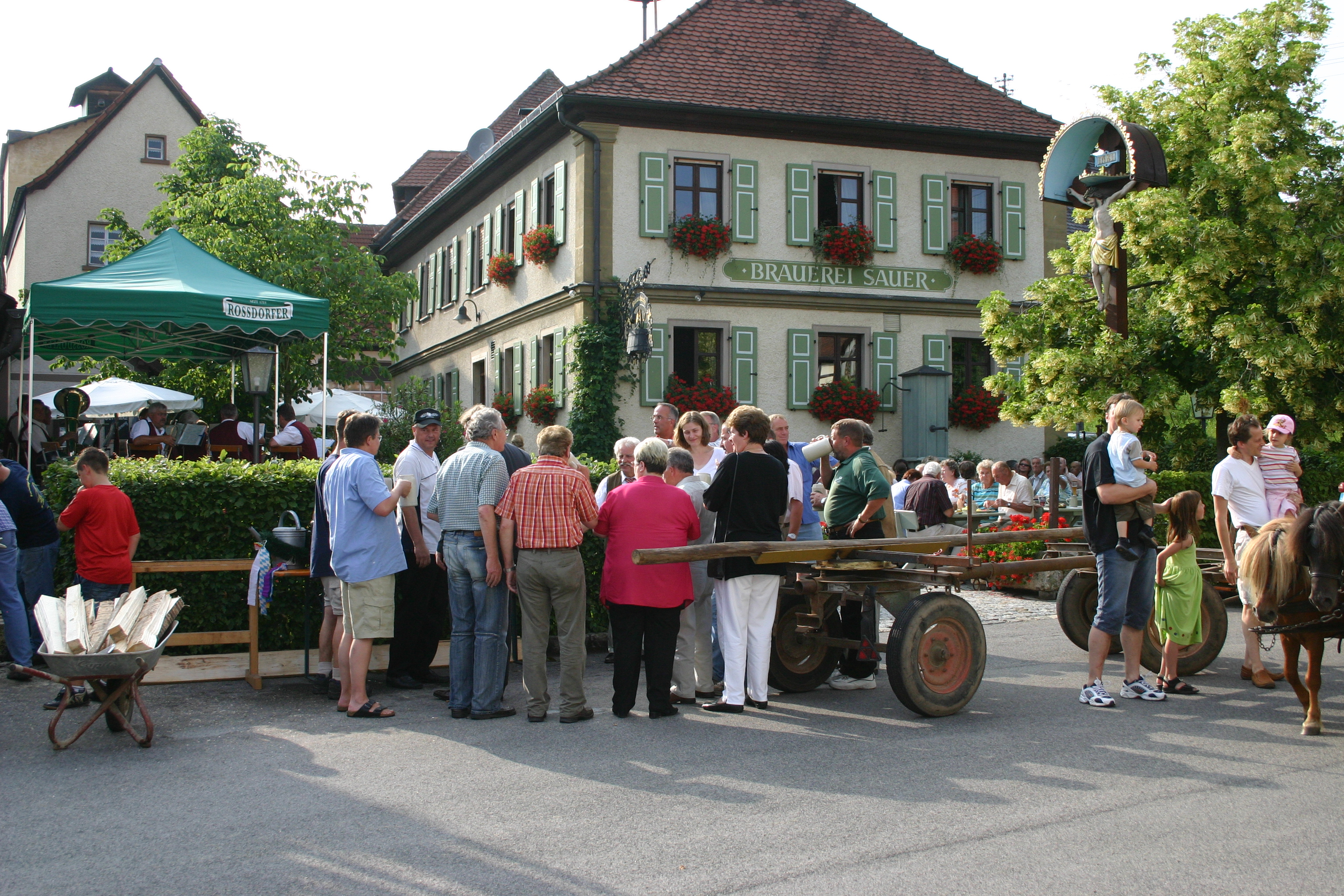 Hauptgebäude der Brauerei Sauer